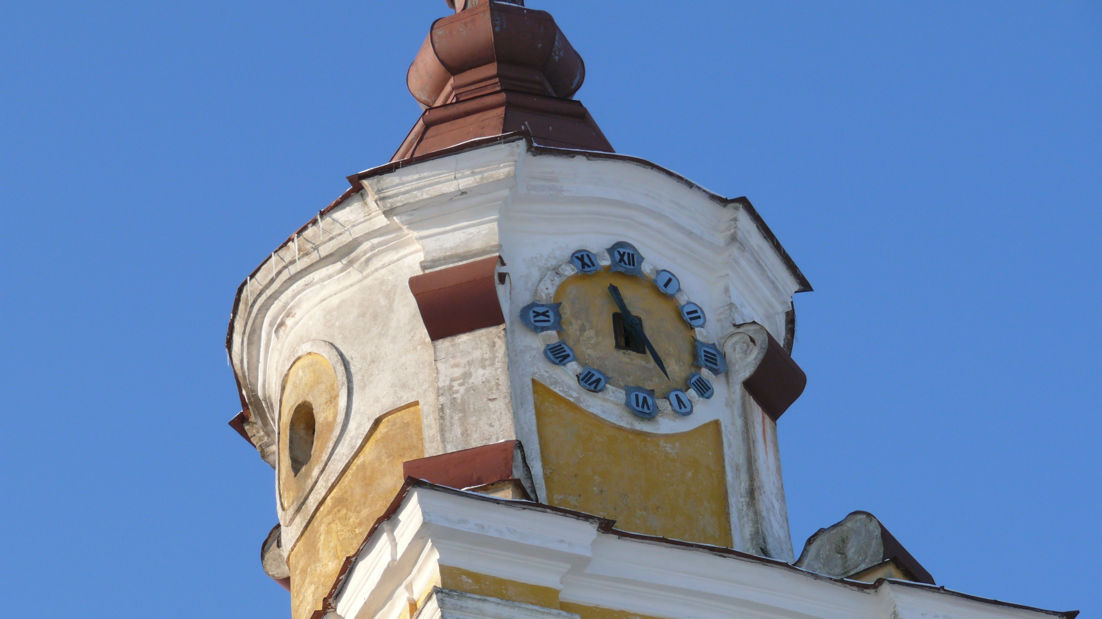 Беларуская (тарашкевіца): Комплекс былога кляштара бэрнардынцаў, дэкаратыўнае аздабленьне касьцёла: галоўны і бакавыя алтары росьпісы. в. Будслаў This is a photo of Belarusian heritage monument. Reference number: 611Г000422 ( WLM)